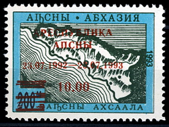 Первая коммеморативная марка Абхазии в честь первой годовщины независимости республики